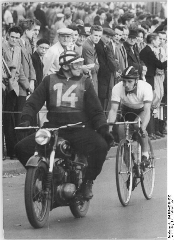 Wustraw Information added by Wikimedia users.Zentralbild Bey-Wen 21.10.1956 Werner-Seelenbinder-Gedenkrennen "Rund um den Marx-Engels-Platz" Am Sonntag, dem 21. Oktober 1956 führten die Rad-Spitzensportler unserer Republik ein Werner-Seelenbinder-Gedenkrennen "Rund um den Marx-Engels-Platz" in Berlin durch. UBz: Siegfried Wustrow hinter seinem Schrittmacher Gerhard Huschke hat sich schon einen ganz schönen Vorsprung erkämpft.